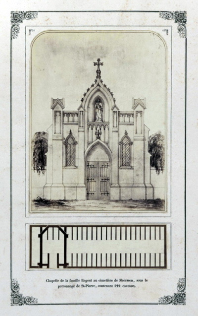 Ontwerptekening van het mausoleum van de familie Regout naast de Basiliek van Meerssen, mogelijk getekend door Wilhelm Wickop, de huisarchitect van Petrus I Regout. De prent is afgebeeld in het Album dédie à mes enfants et mes amis (Maastricht/Parijs, 1868), dat de Maastrichtse ondernemer en "nouveau riche" Petrus Regout liet samenstellen om zijn rijkdom te tonen. Collectie RHCL Maastricht.